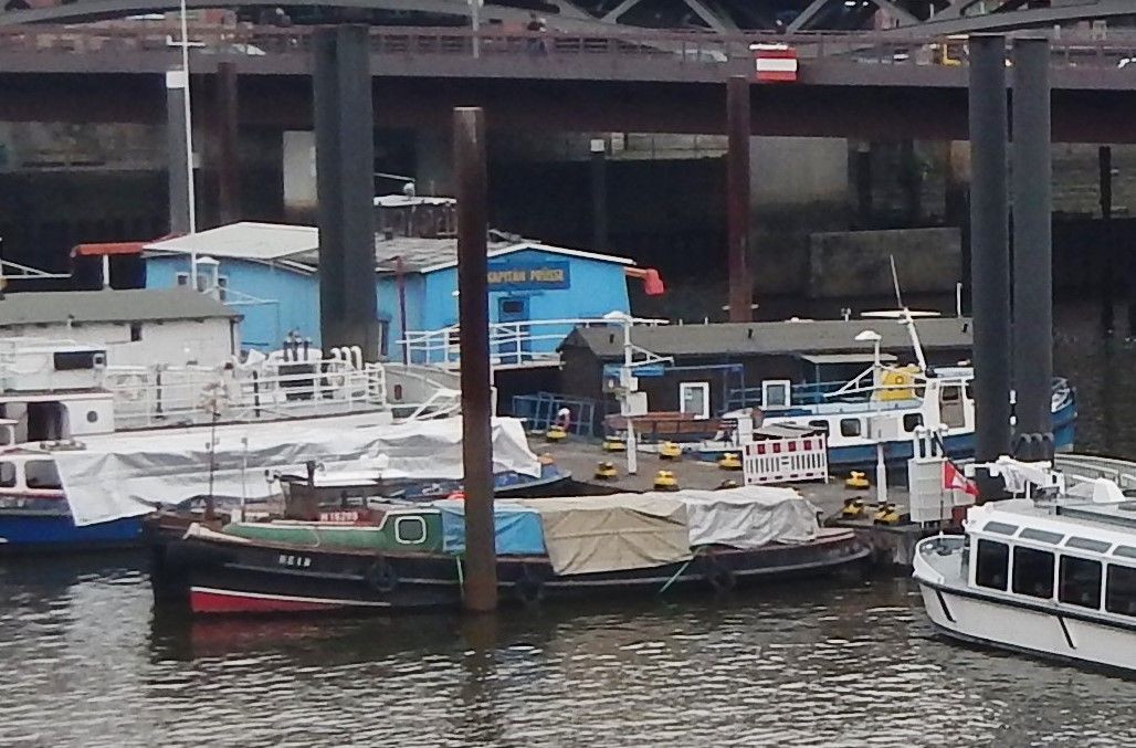 Hein